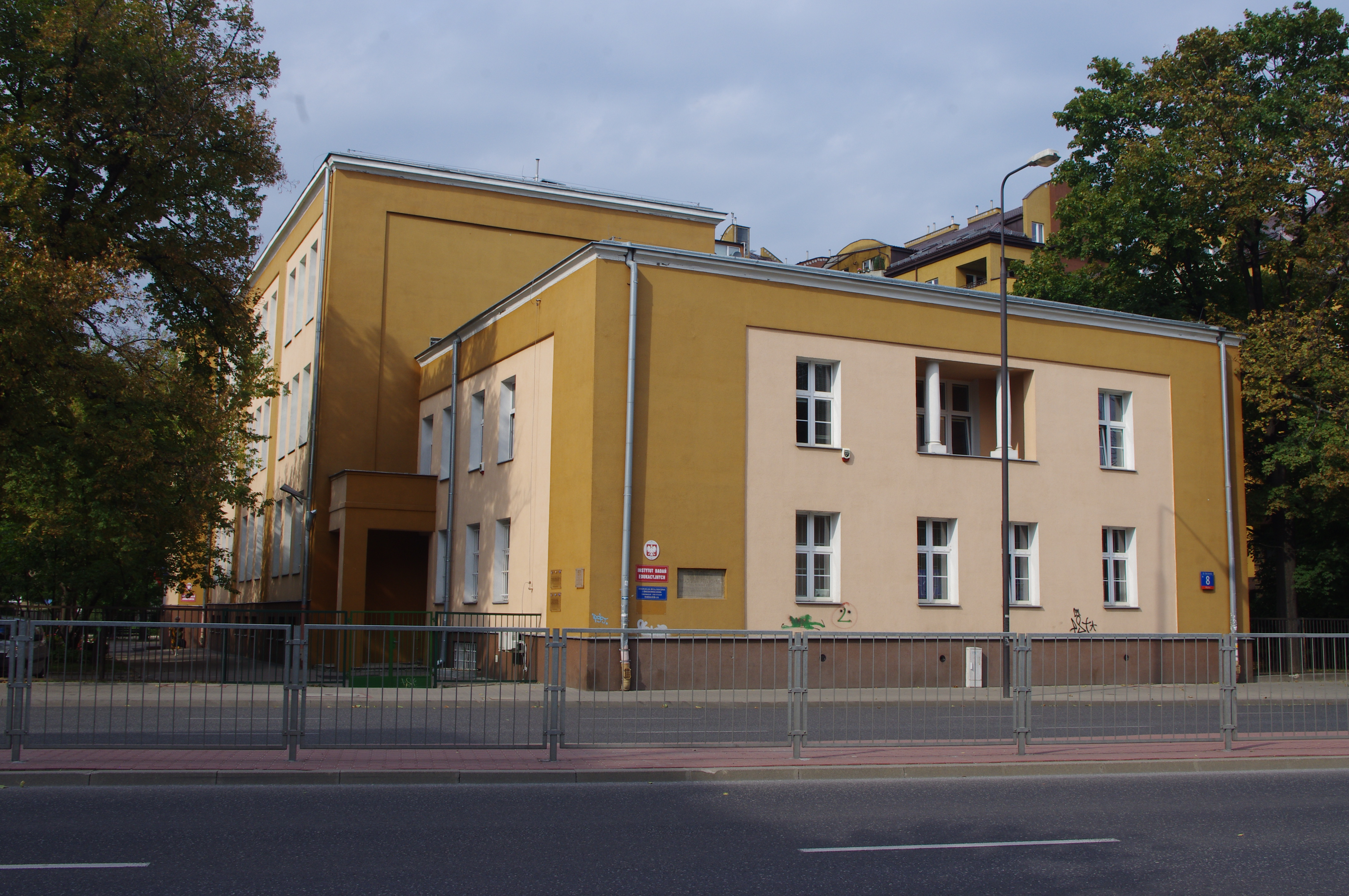 Górczewska 8 w Warszawie (dawny Państwowy Instytut Robót Ręcznych)